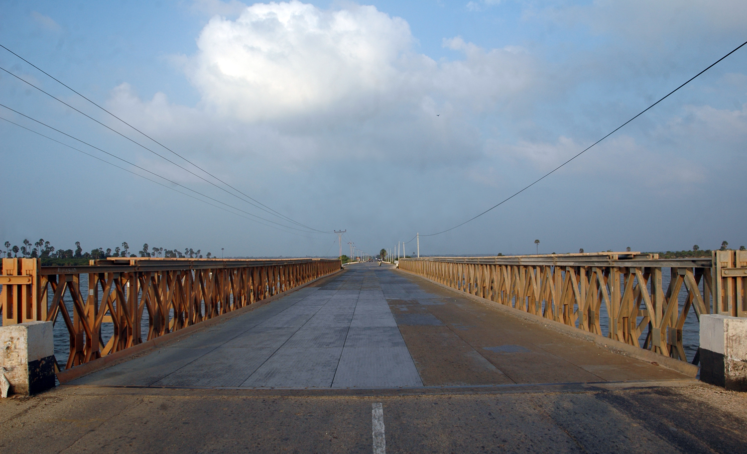 Vallai Bridge, Jaffna